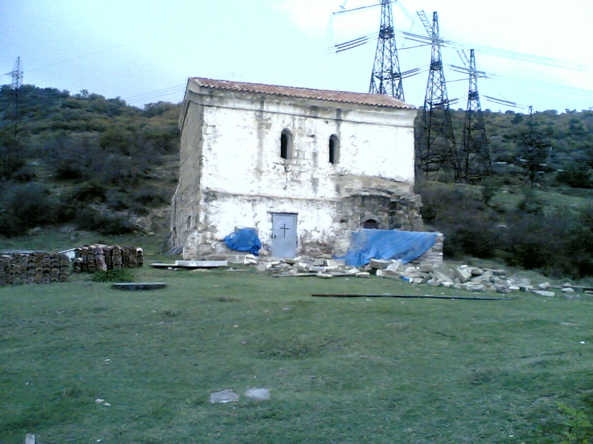 სოფ. გლდანის წმ. გრიგოლ ღვთისმეტყველის ეკლესია